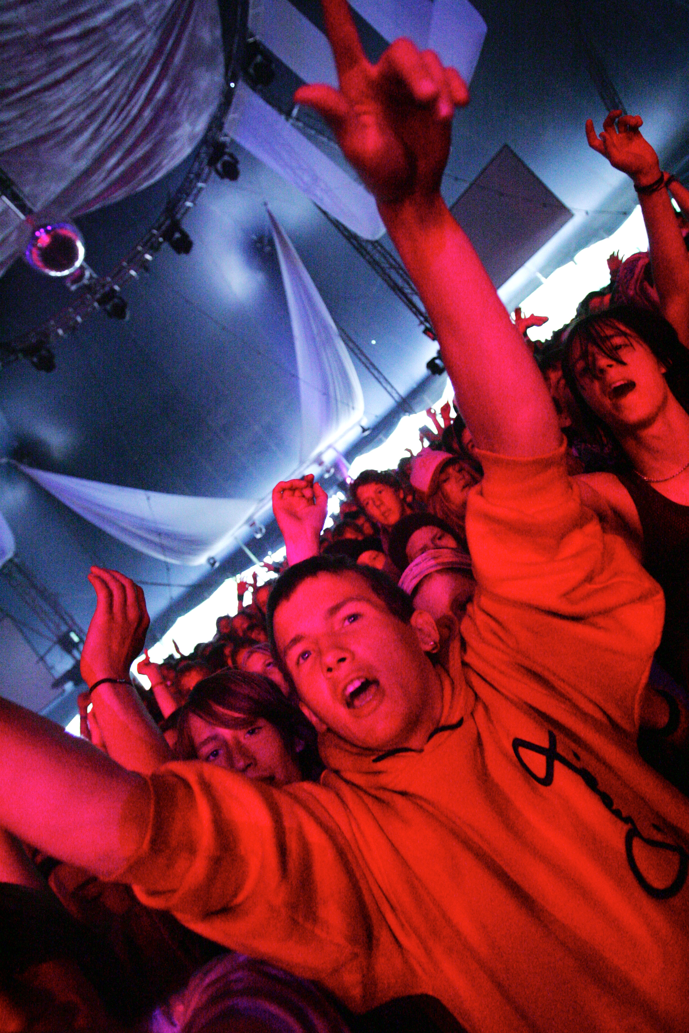 Konsert